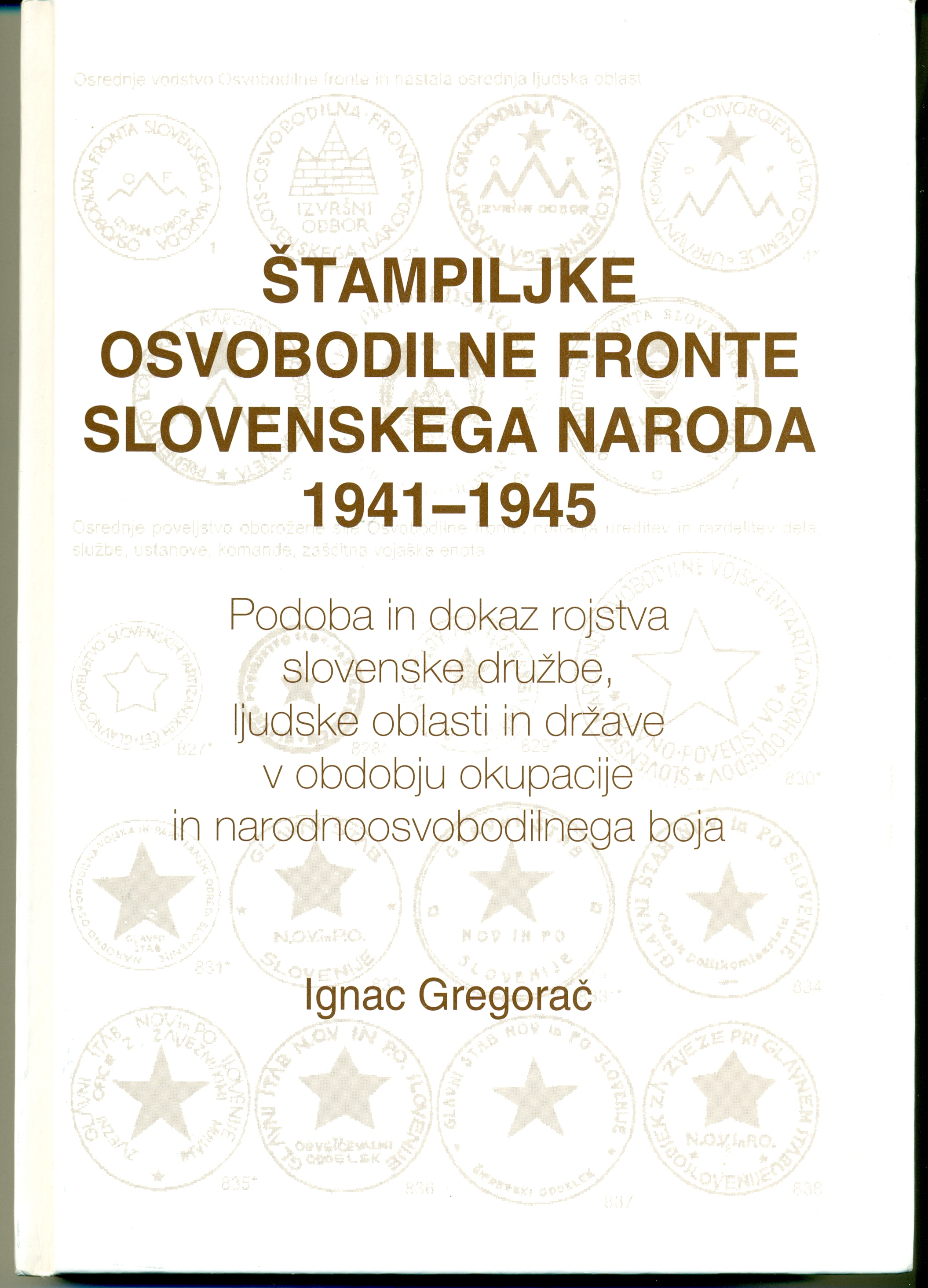 Štampiljke OF 1941-1945